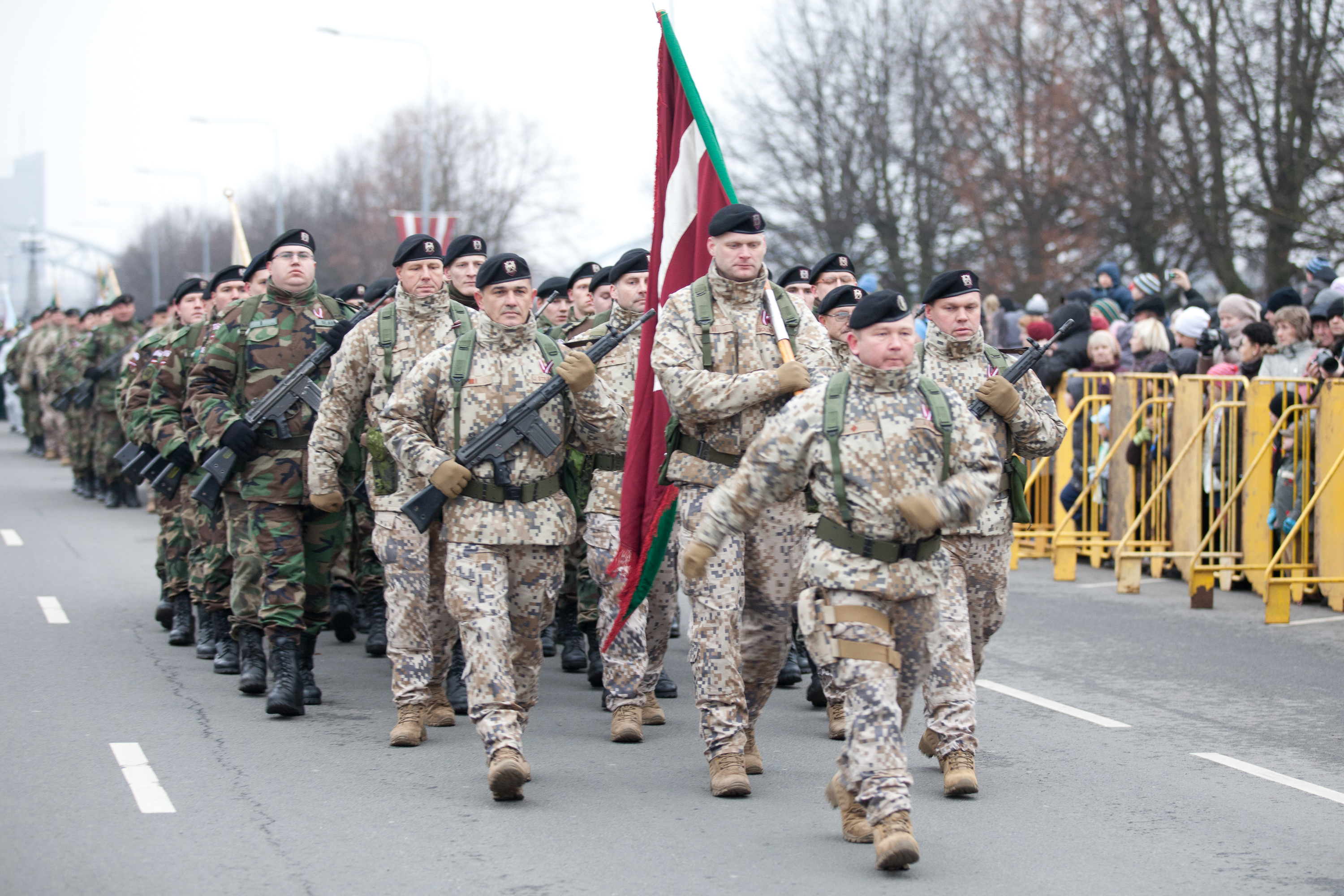 Foto: Toms Norde, Valsts kanceleja